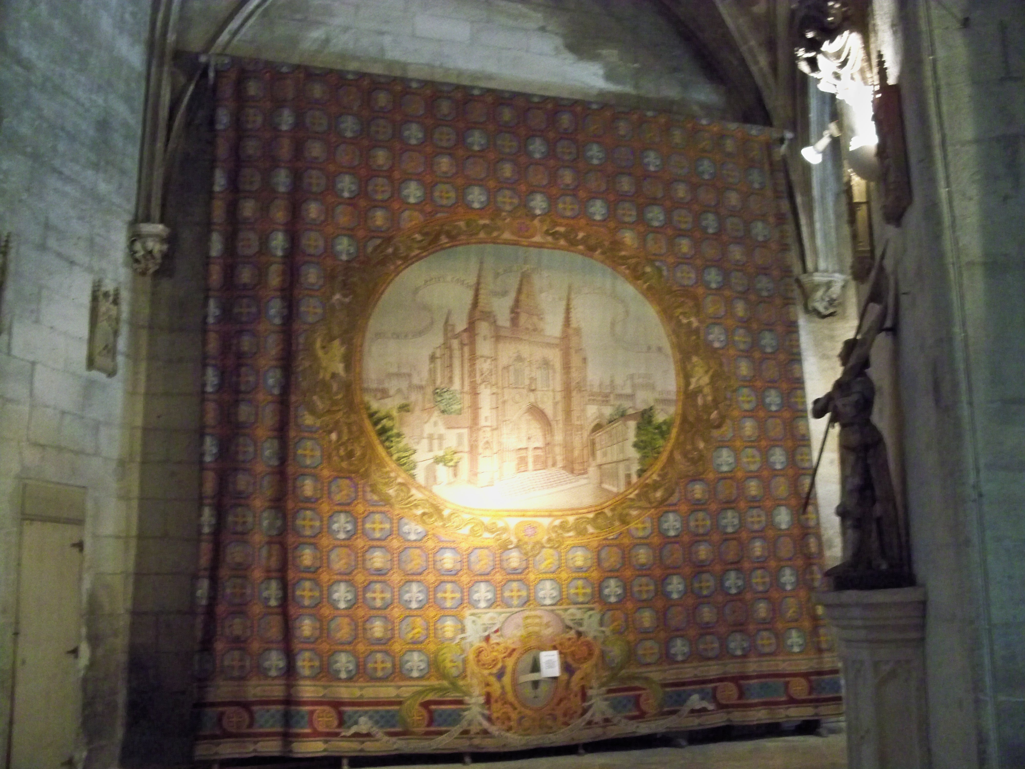 Tapis d'Avignon, à l'église de Saint Pierre d'Avignon, Vaucluse